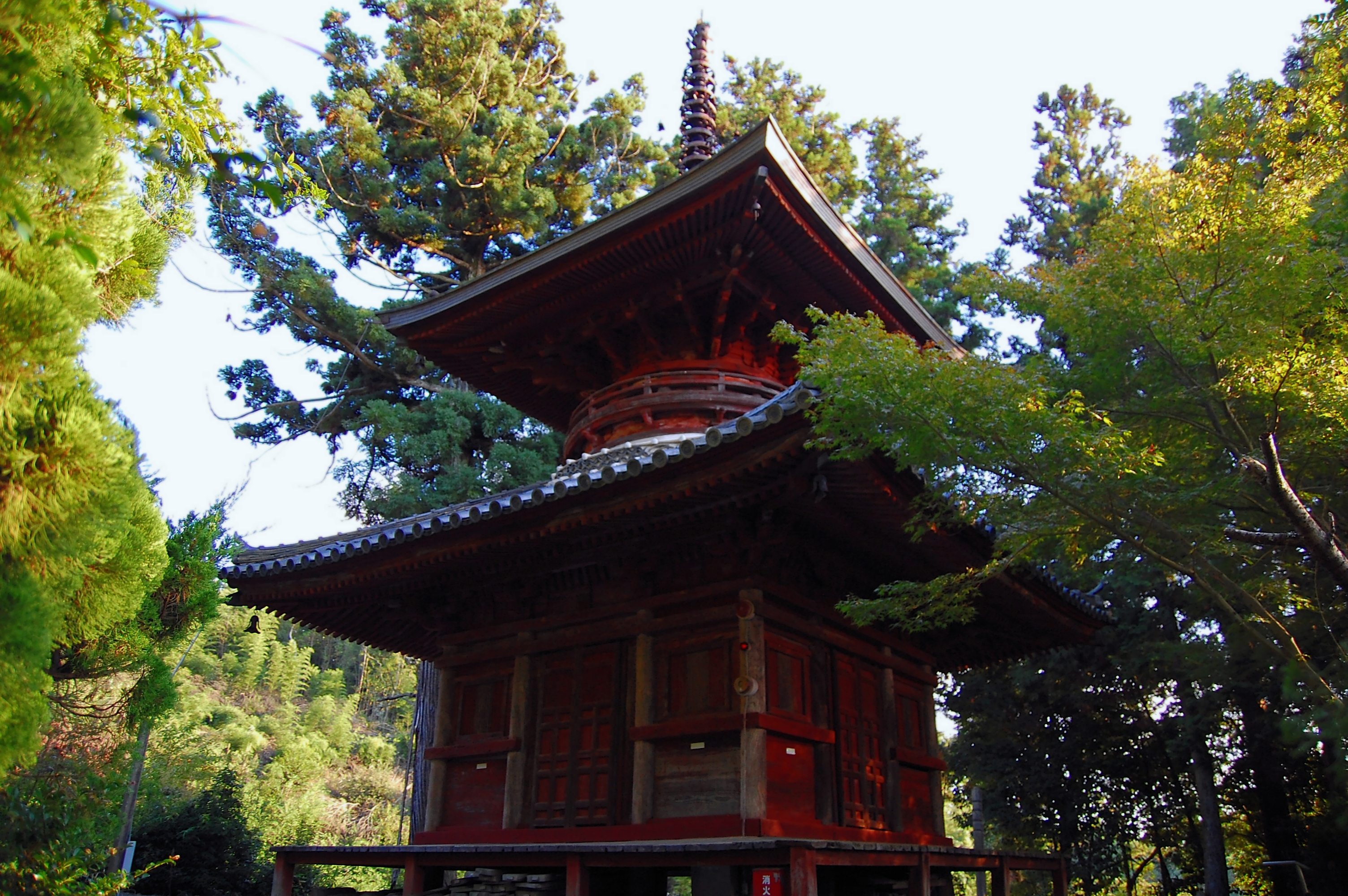 姑射山東光寺 (三木市)多宝塔